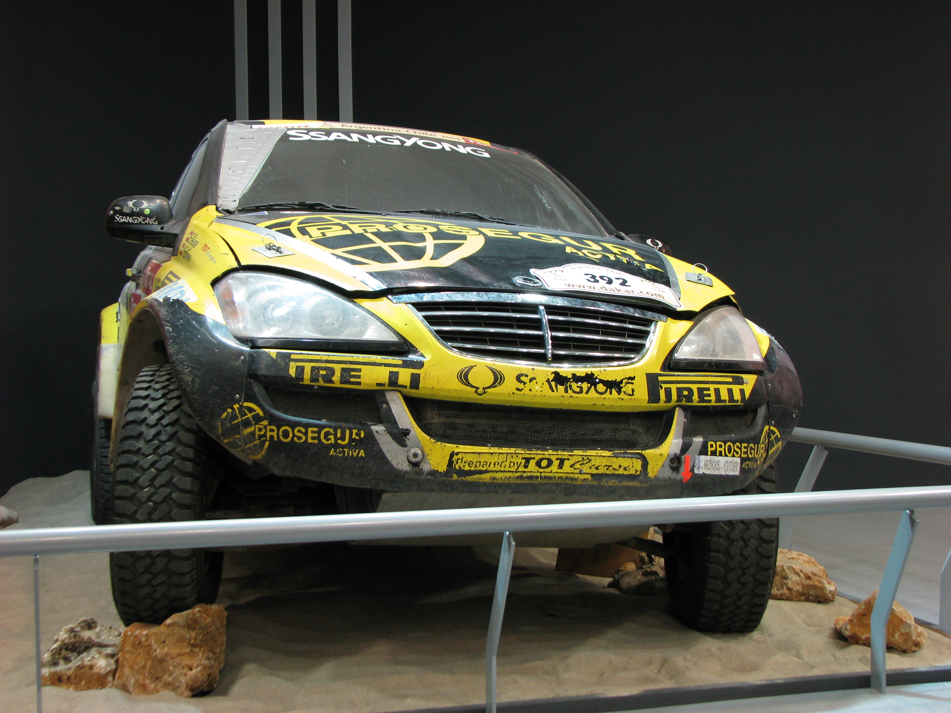 SSangyong Kyron utilizado por Isidre Esteve expuesto en el Salón Internacional del Automóvil de Barcelona 2009